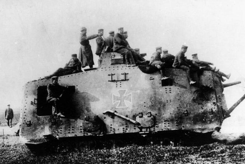 Juli 1918